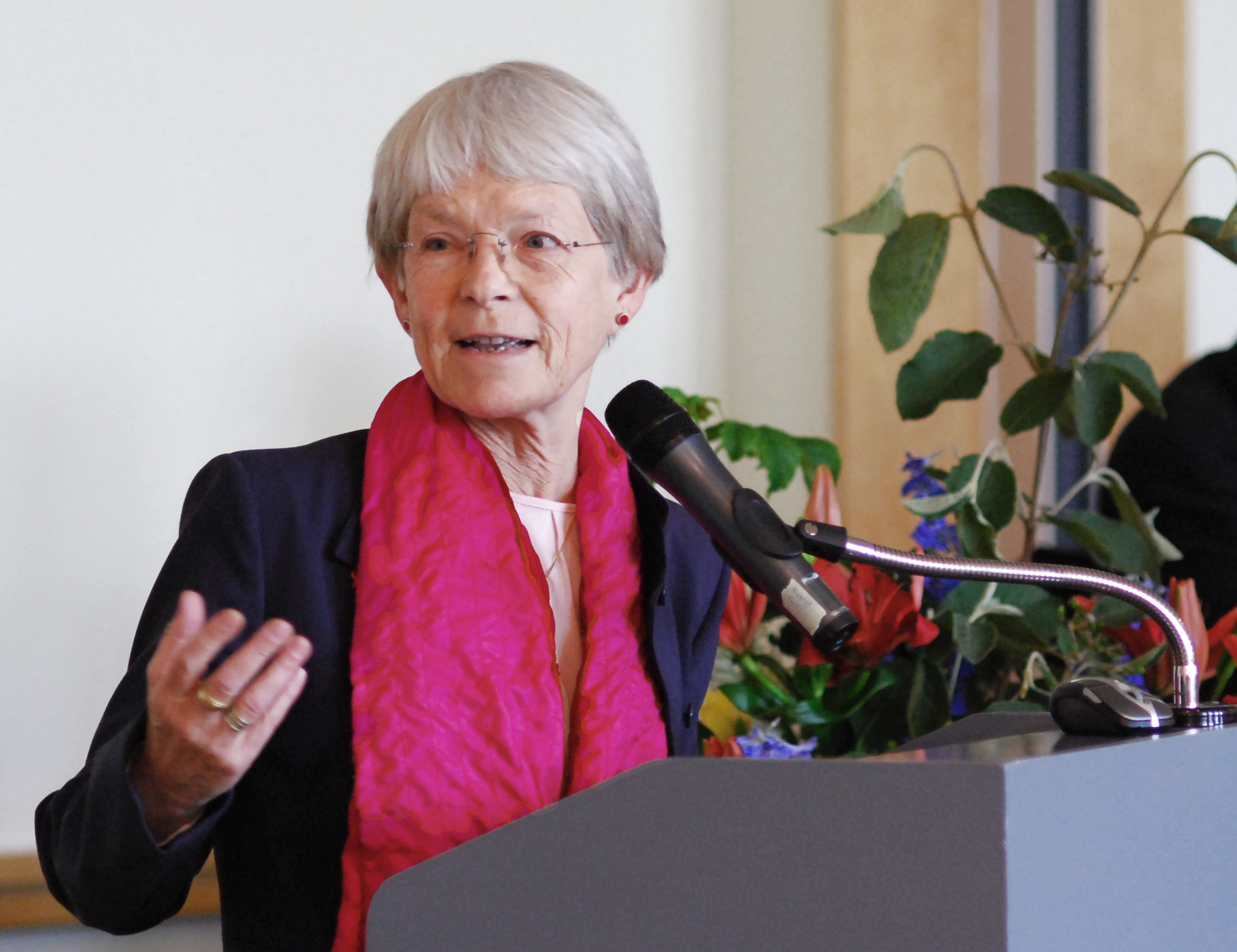 Maria Jepsen, Bischöfin des Sprengels Hamburg-Lübeck der Nordelbischen Kirche, in der Aussprache über den Reformbericht während der Nordelbischen Synode vom 5.–6. Juni 2009 in Lübeck, Deutschland (Foto: Pittkowski)